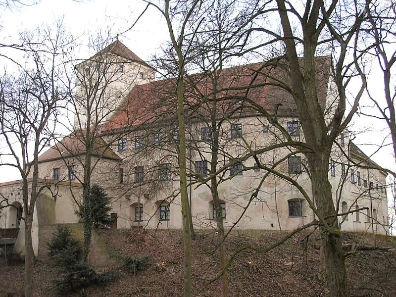 Schloss Friedberg (Landkreis Aichach, Friedberg, Bayerisch-Schwaben). Gesamtansicht von Nordosten. Eigene Aufnahme, Nov. 2006 / Friedberg castle near Augsburg (Bavaria, Germany). Total view from north east. Own photo, Nov. 2006